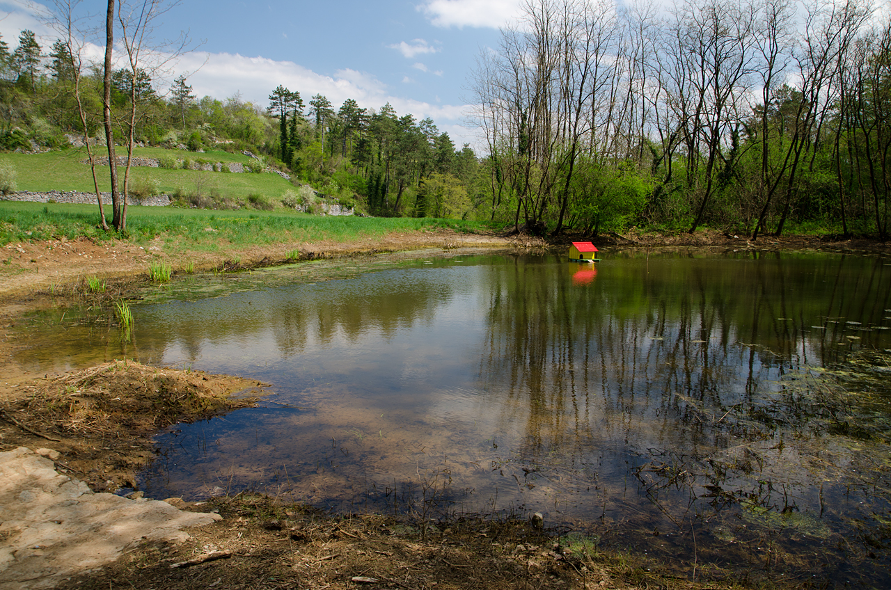 Kal Mlačna ob vasi Pliskovica na krasu.